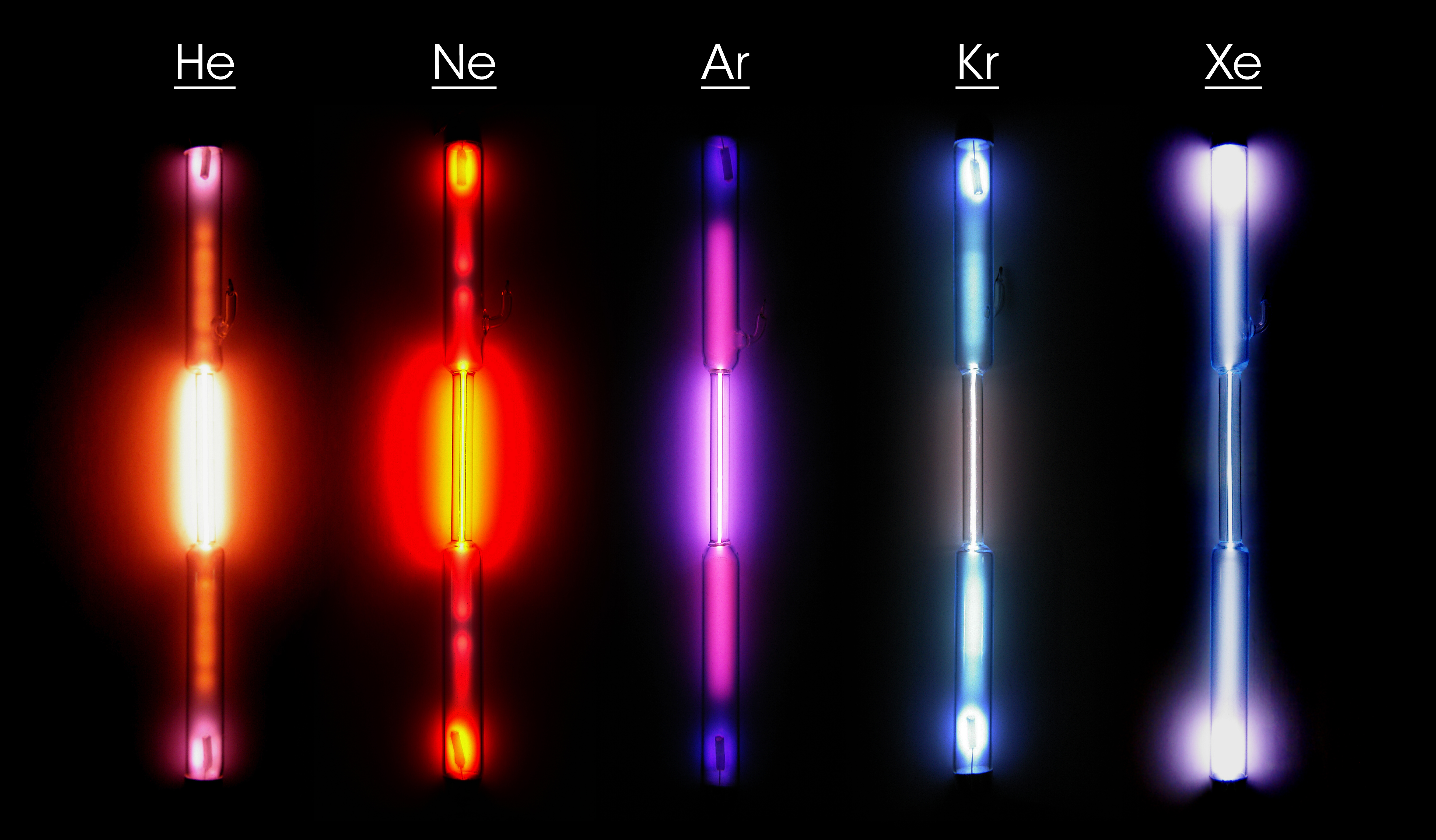 Cinq tubes à gaz : Hélium, Néon, Argon, Krypton, Xénon.